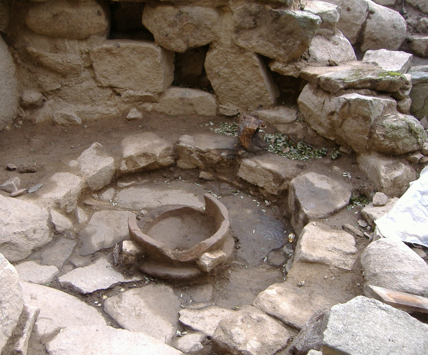 Villaggio Nuragico Gennaccili - Seleni - XV-XIV secolo a.C. This is a photo of a monument which is part of cultural heritage of Italy.